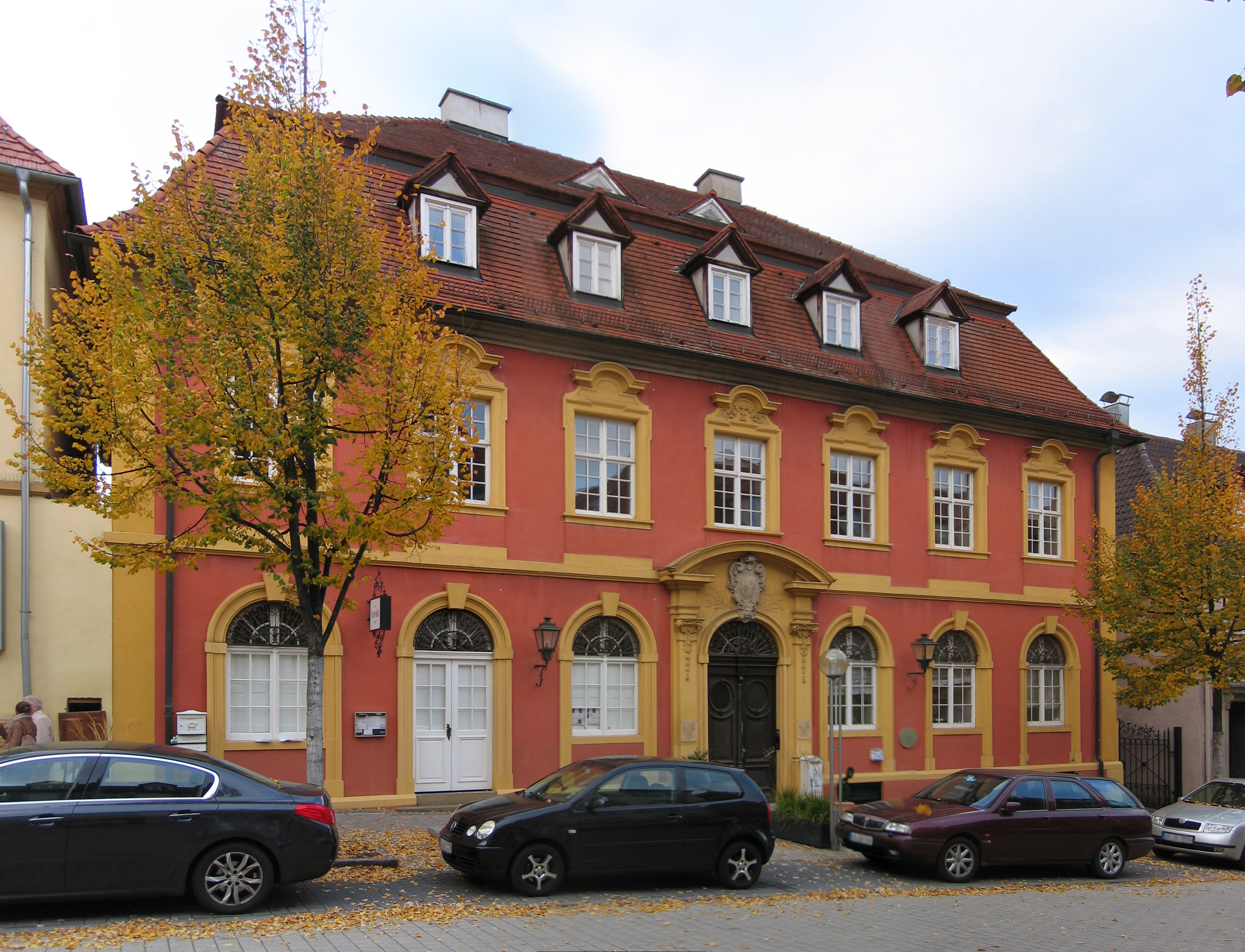 Grävenitz Palais, Marstallstraße 5, Ludwigsburg